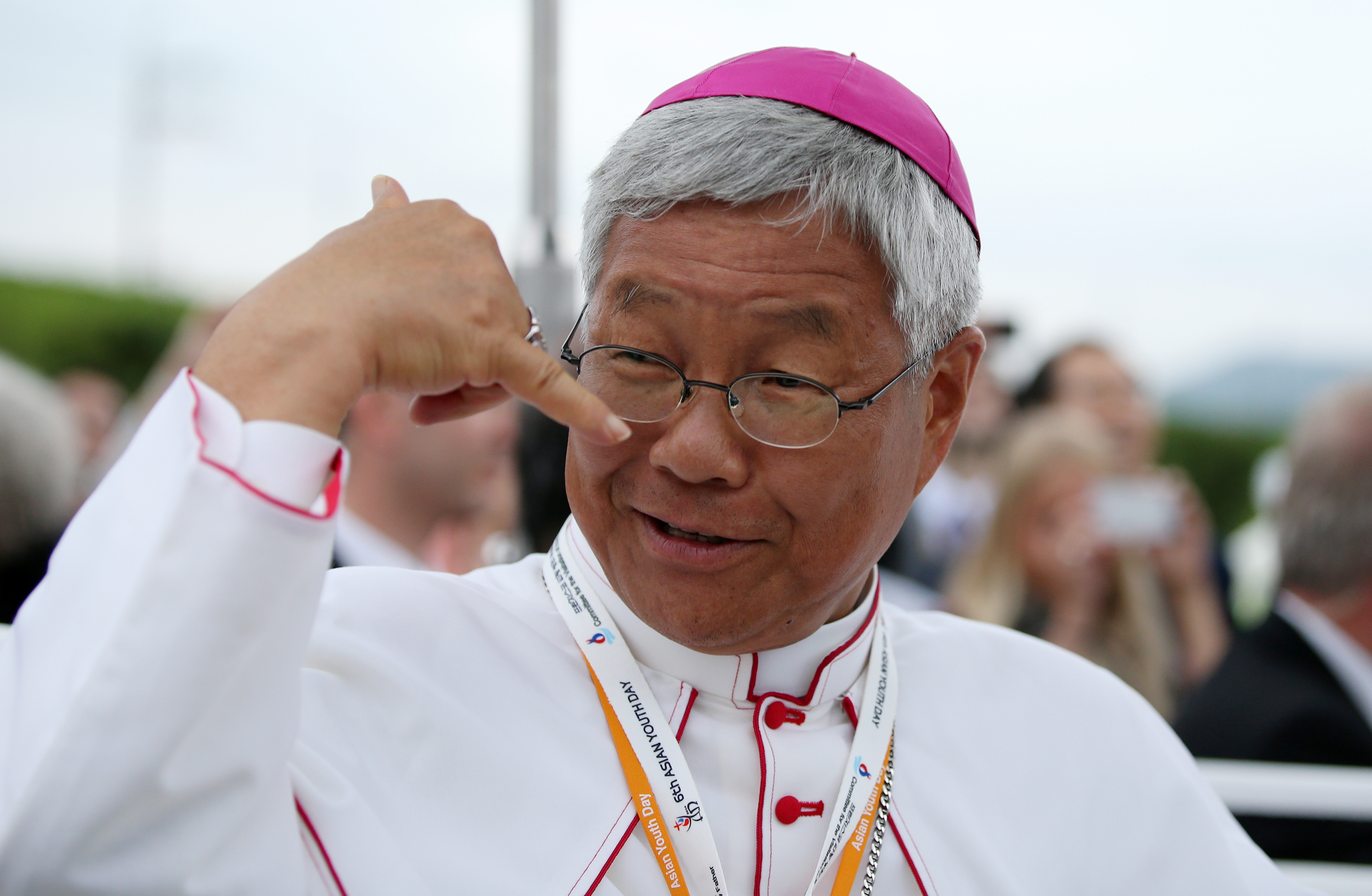 Mgr Lazarus You Heund-sik évêque de Daejeon